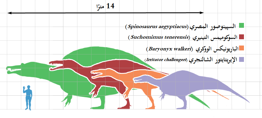 مُقارنة بين أحجام بضعة أنواع من السپينوصوريَّات والإنسان. بالاستناد على رُسومٍ بيانيَّةٍ مقياسيَّة صنعها سكوت هارتمان.